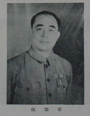 中國人民政治協商會議第一屆全體會議代表